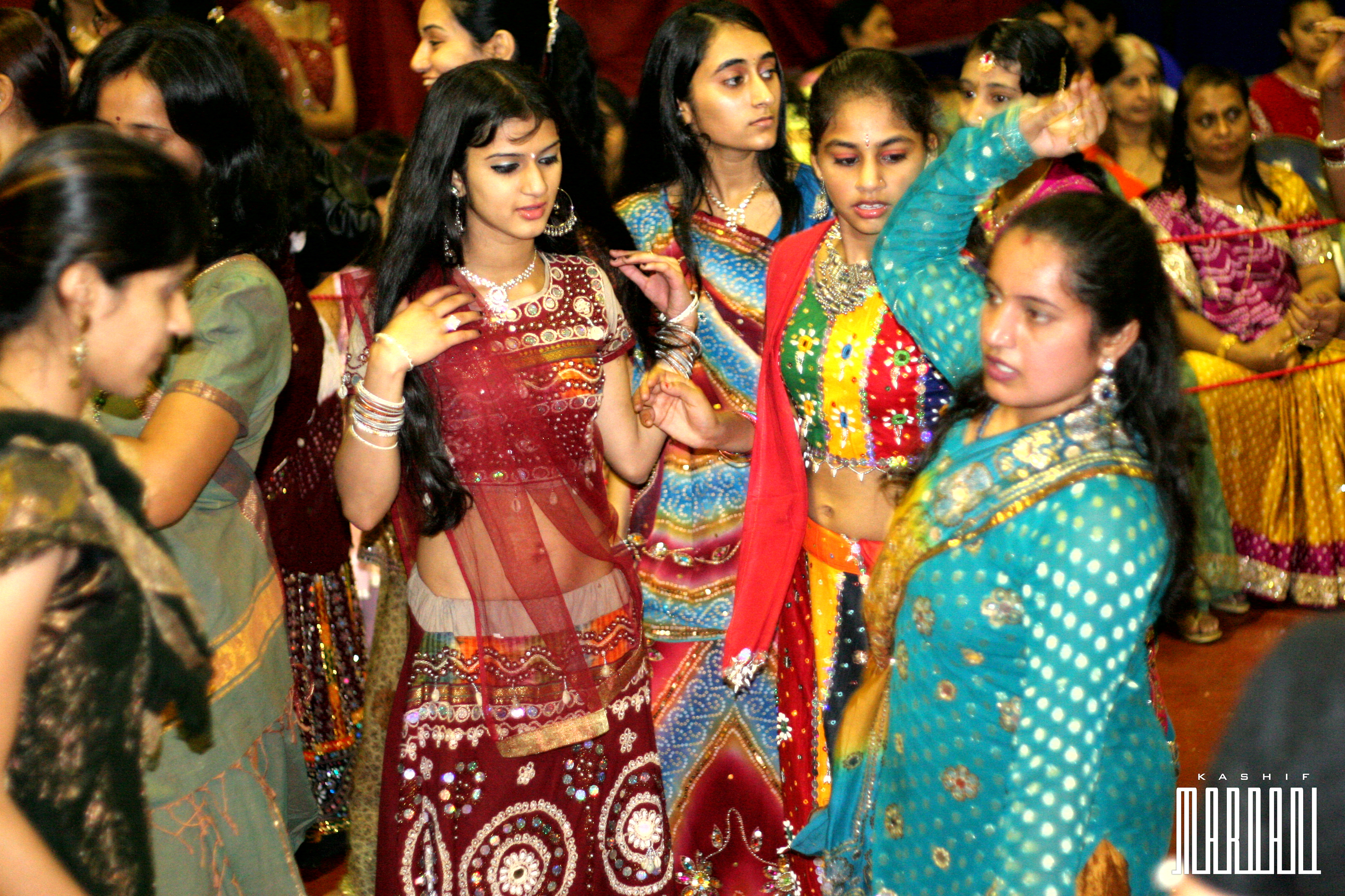 Social function, Hinduism in Mozambique